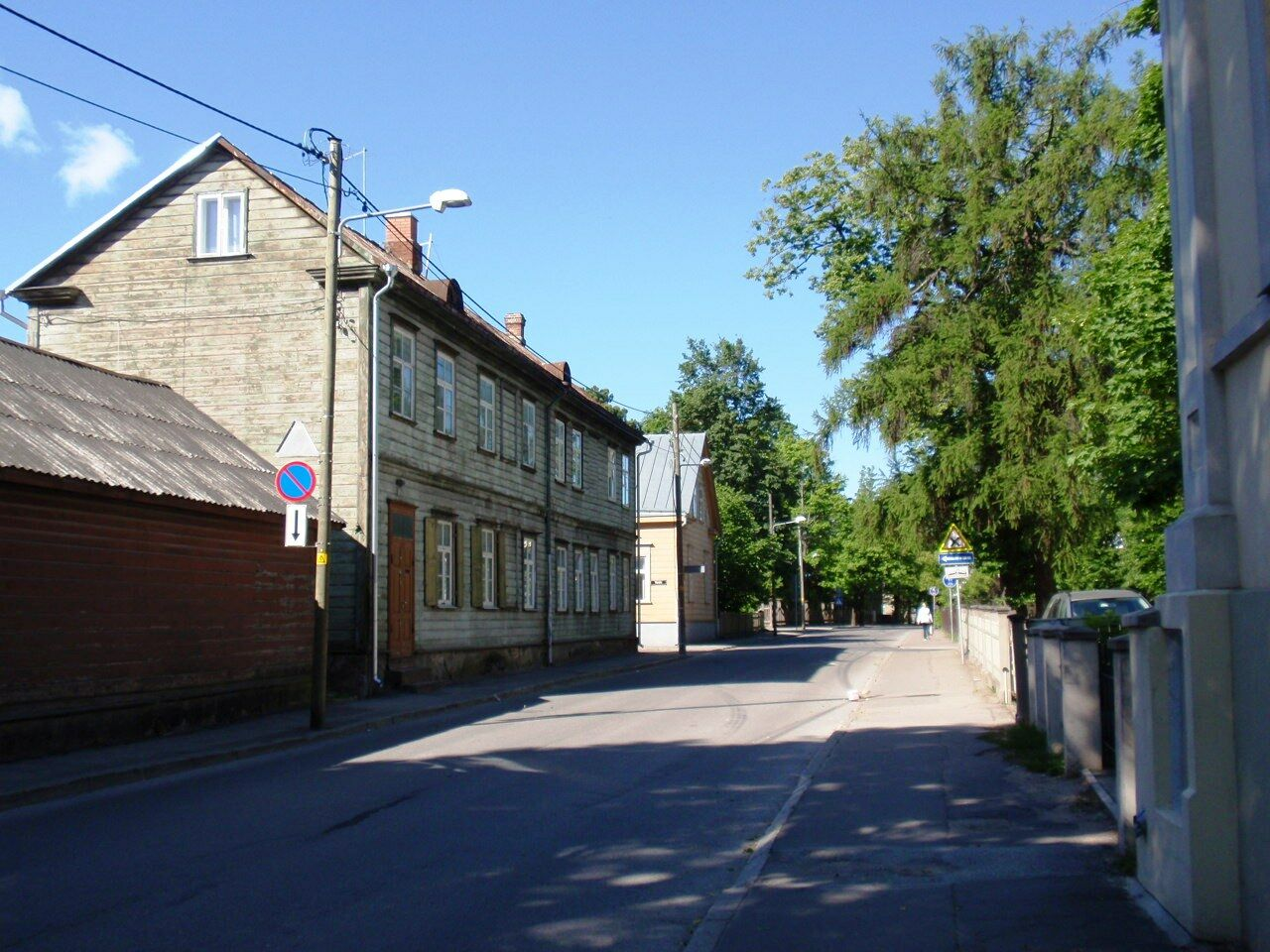 Näituse tänav Tartus.